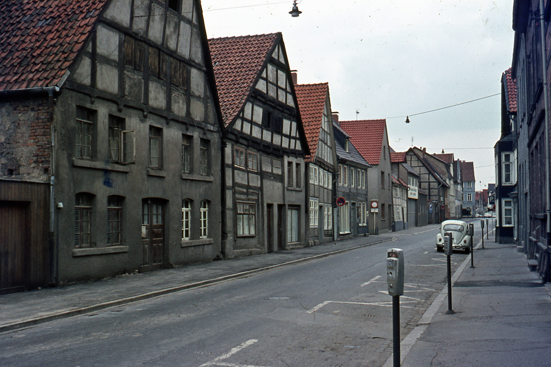 Lemgo. Mittelalterliche Fachwerkhäuser in der Echternstraße Hausnummer 41 (links) 43, 45 und 47 (rechts) etwa im Jahr 1970. In den 1990er Jahren wurden drei der unter Denkmalschutz stehenden Häuser vollkommen entkernt und mit den alten Baumaterialien, im wesentllichen Holzbalken, neu aufgebaut. Lediglich das Haus mit der Nummer 47 (rechts) blieb mit den Grundmauern und der Fassade im alten Zustand erhalten.